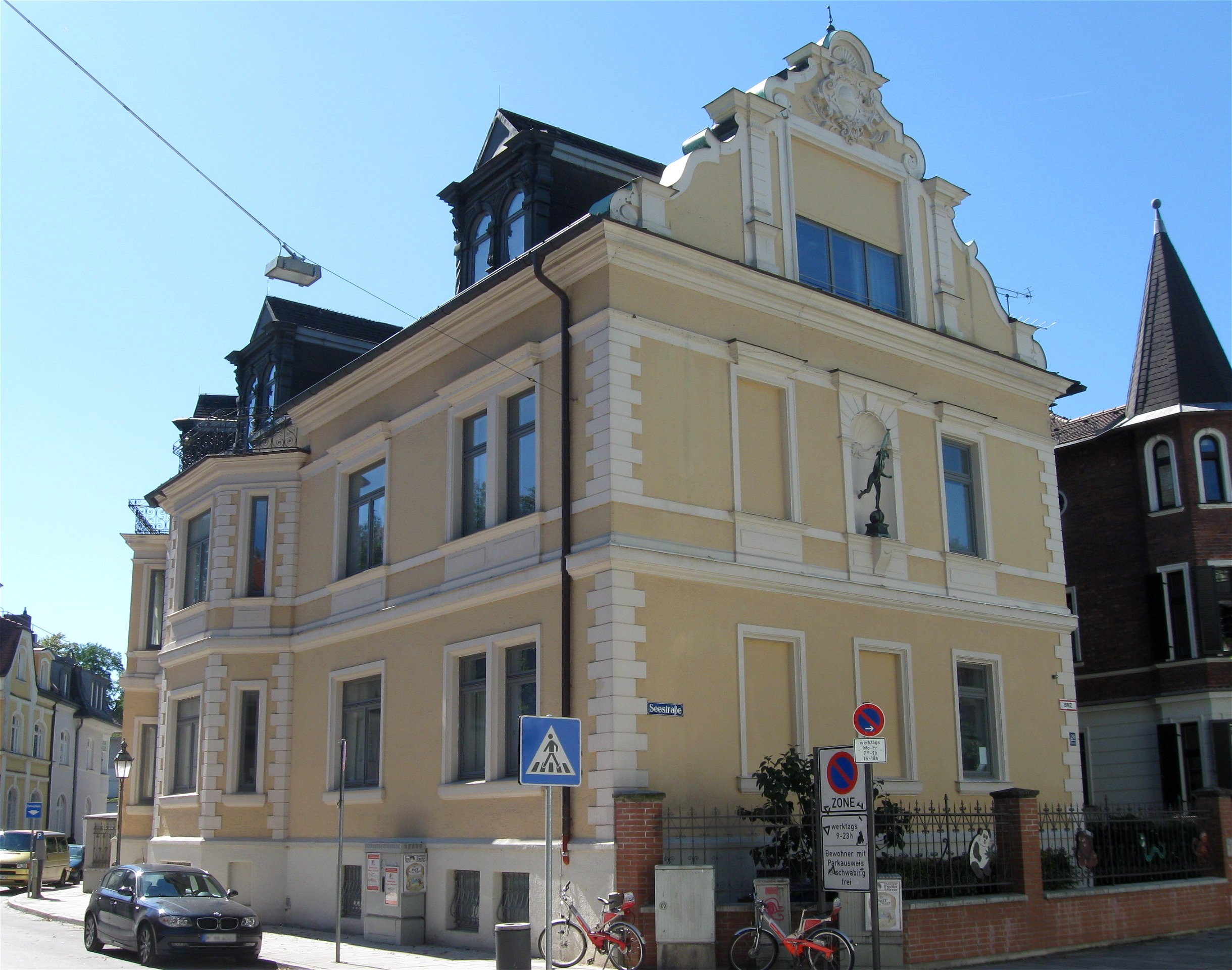 Seestraße 20; Palais Crailsheim, freistehender Eckbau in Neurenaissance, 1891-92 von Josef Vasek; mit Bronzefigur Merkurs und Schweifgiebel. Südlich im Garten Remise mit Schweifgiebel, 1902-03.